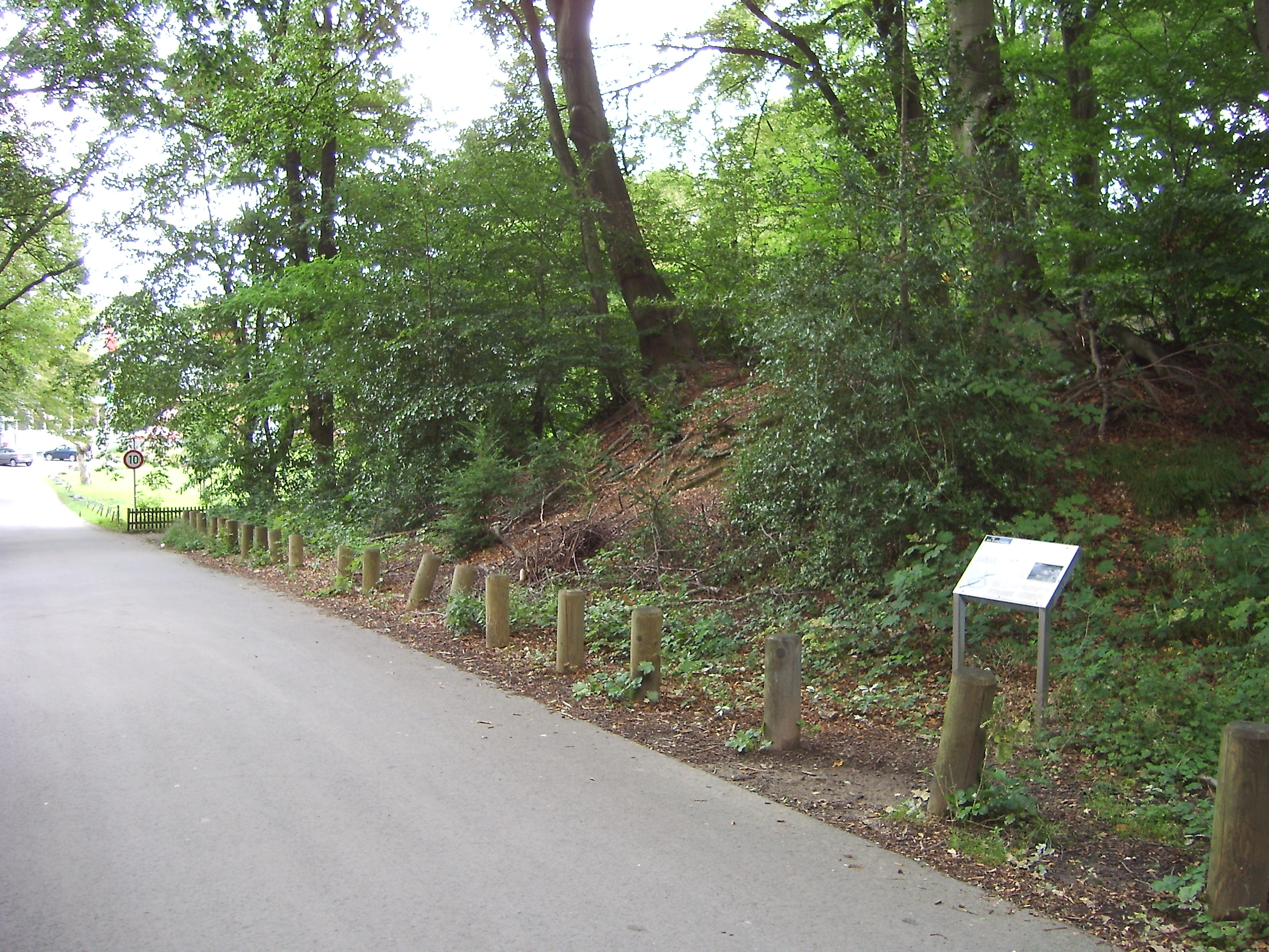 Location der ehemaligen Herrenburg am Pastoratsberg Essen-Heidhausen, links Jugendherberge